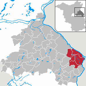 Amt Golzow in Brandenburg (Country) - District Märkisch-Oderland